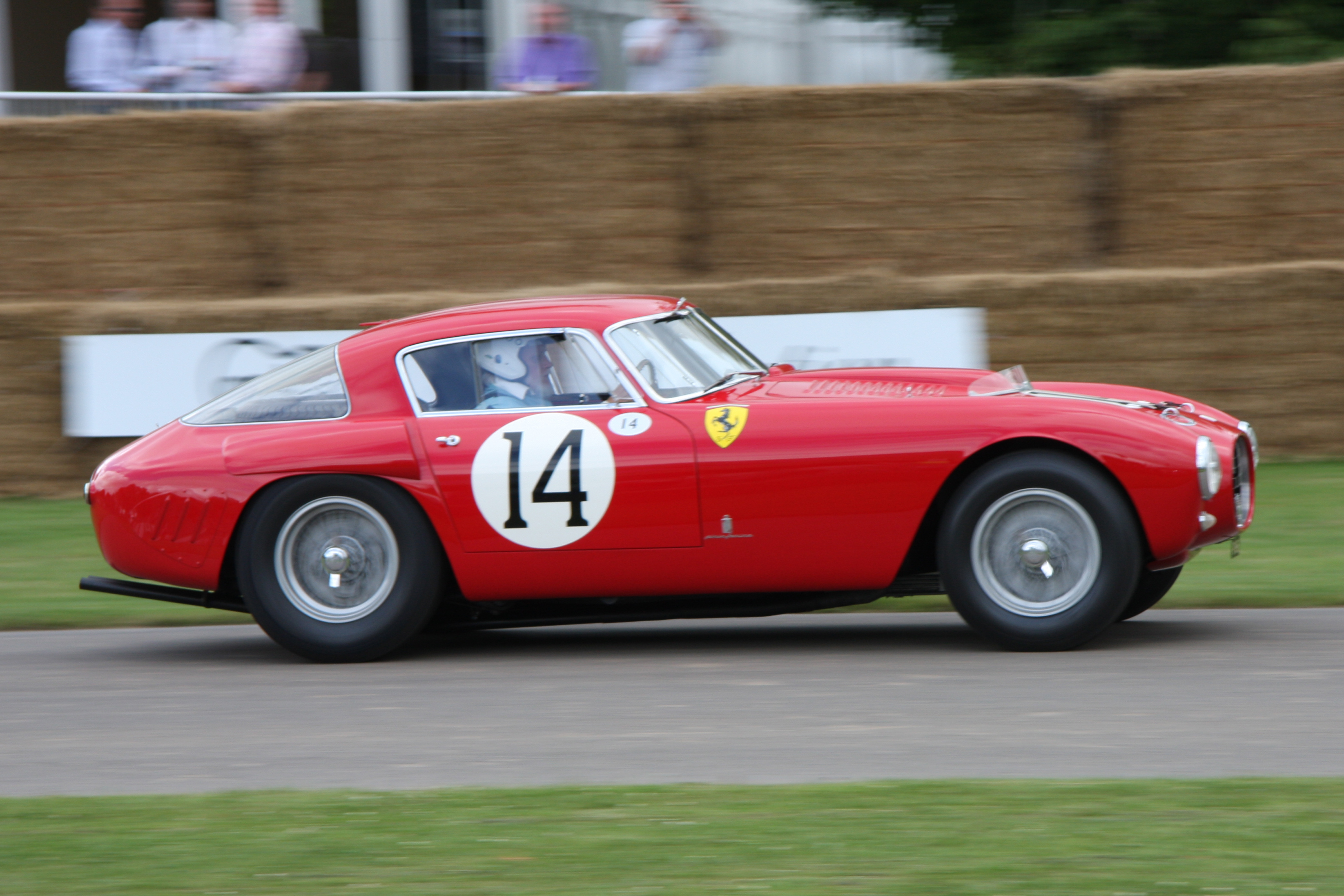 Built 1953. 4.5 litre V12